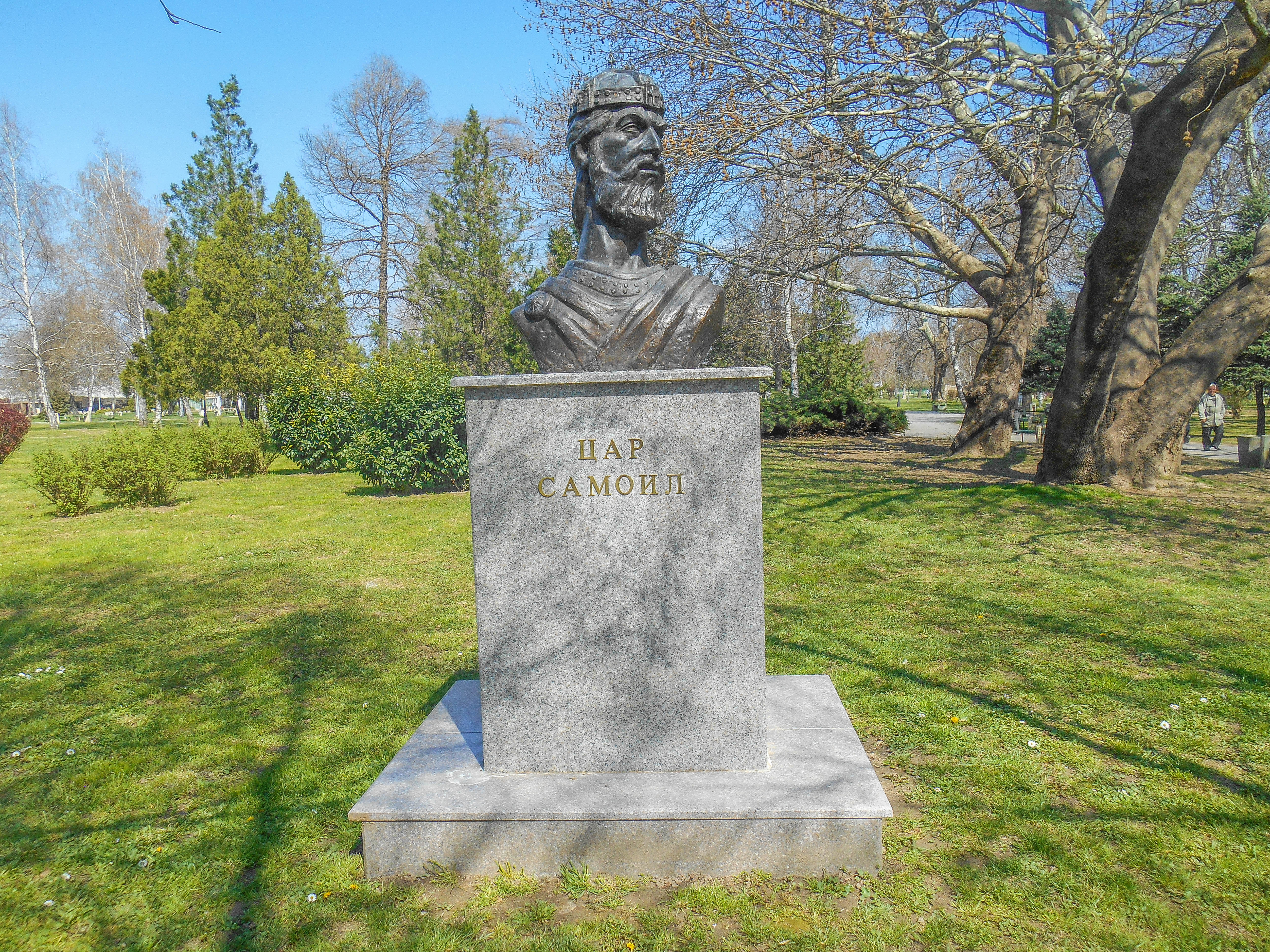 Споменик на цар Самоил